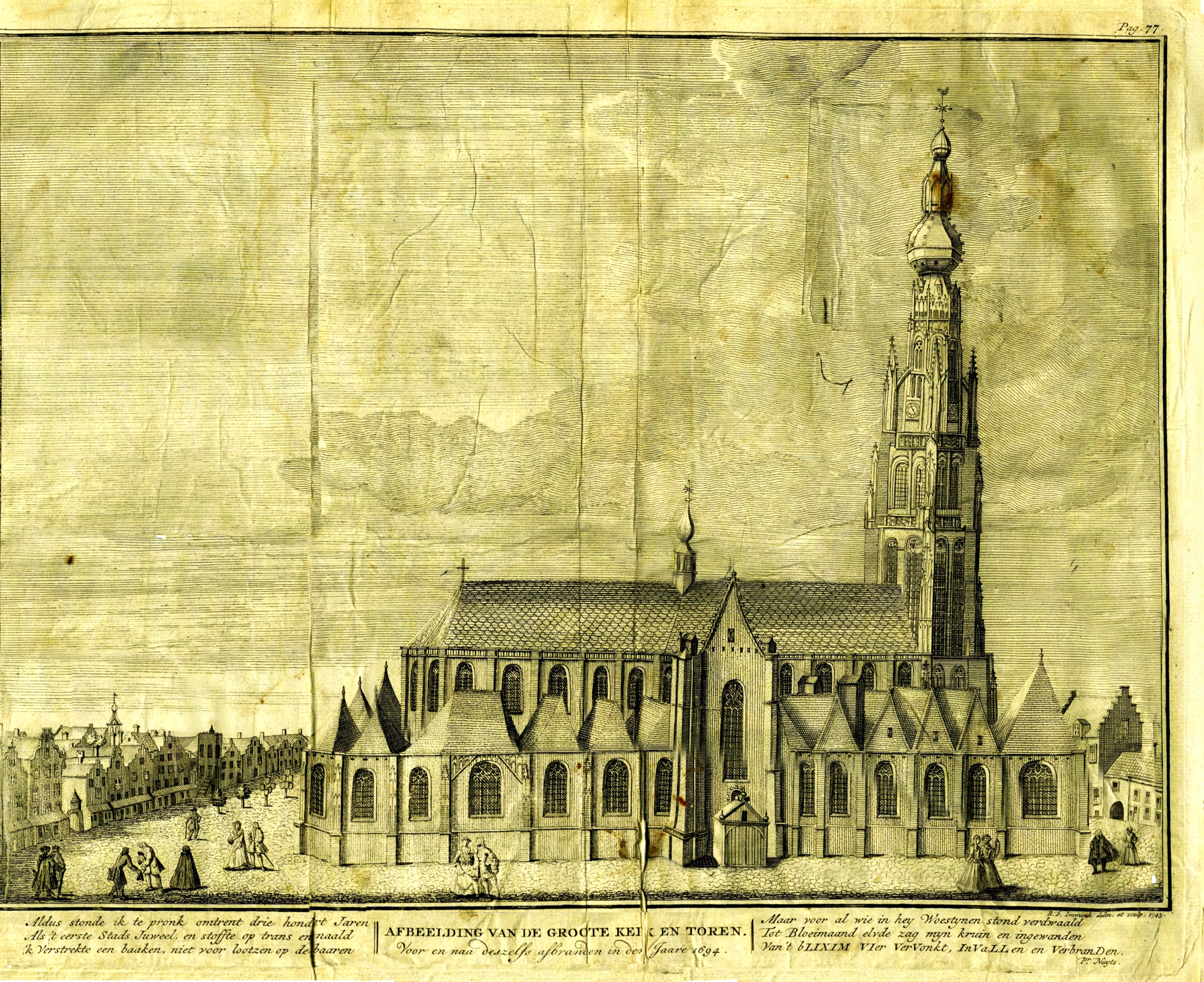 De grote kerk met de toren van vóór 1694. In dat jaar werd de toren op 11 mei door de bliksem getroffen en brandde af, waarna de toren in zijn huidige vorm is herbouwd